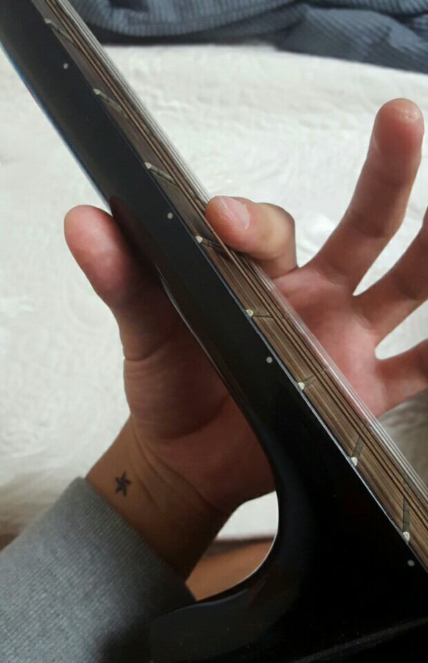 조선말: 하모닉스 주법을 사용하기 위해 손을 갖다댄 모습이다.